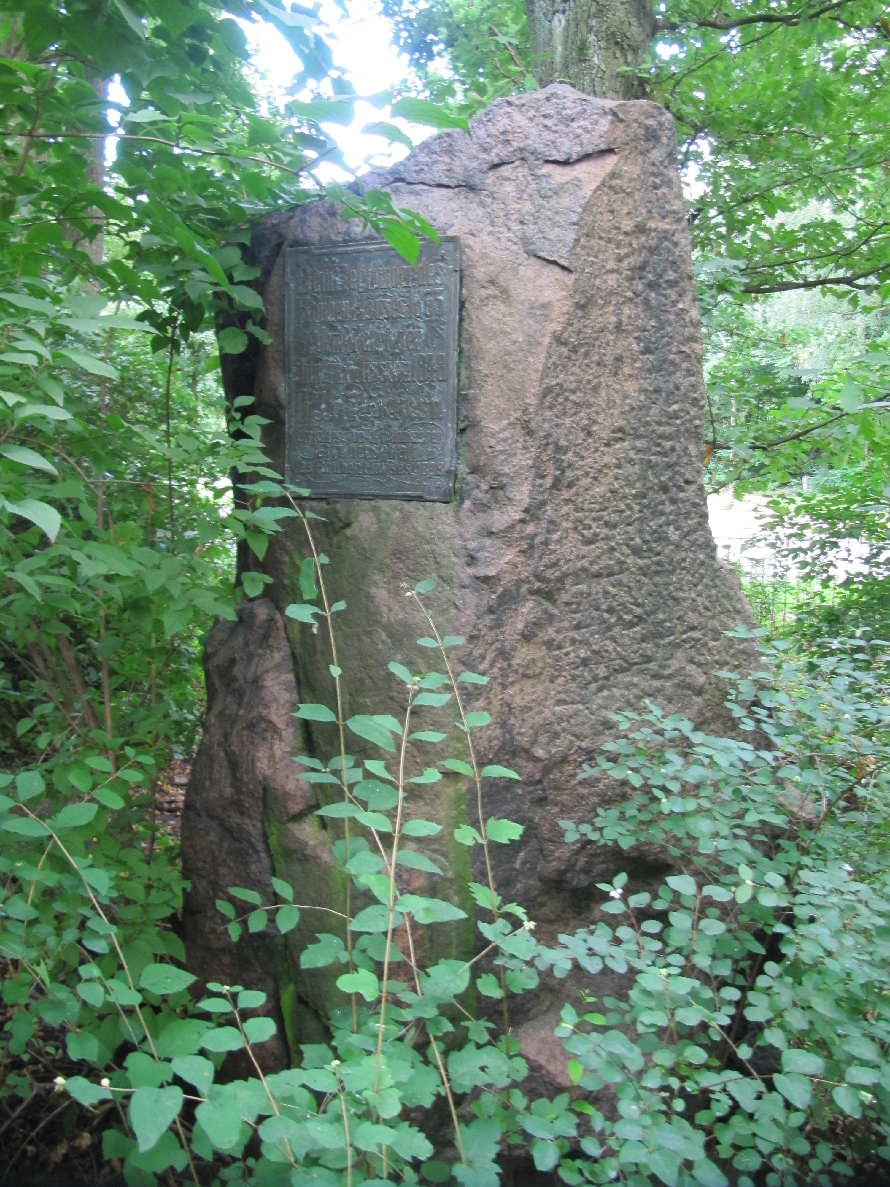 Wichern-Gedenkstein Hamburg-Horn 1